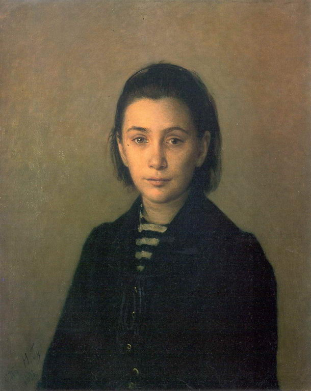 Ге Николай Николаевич. Портрет Ольги Павловны Костычевой (род. 1880), дочери П.А. Костычева 1891. Холст, масло. 64 х 53. Русский музей